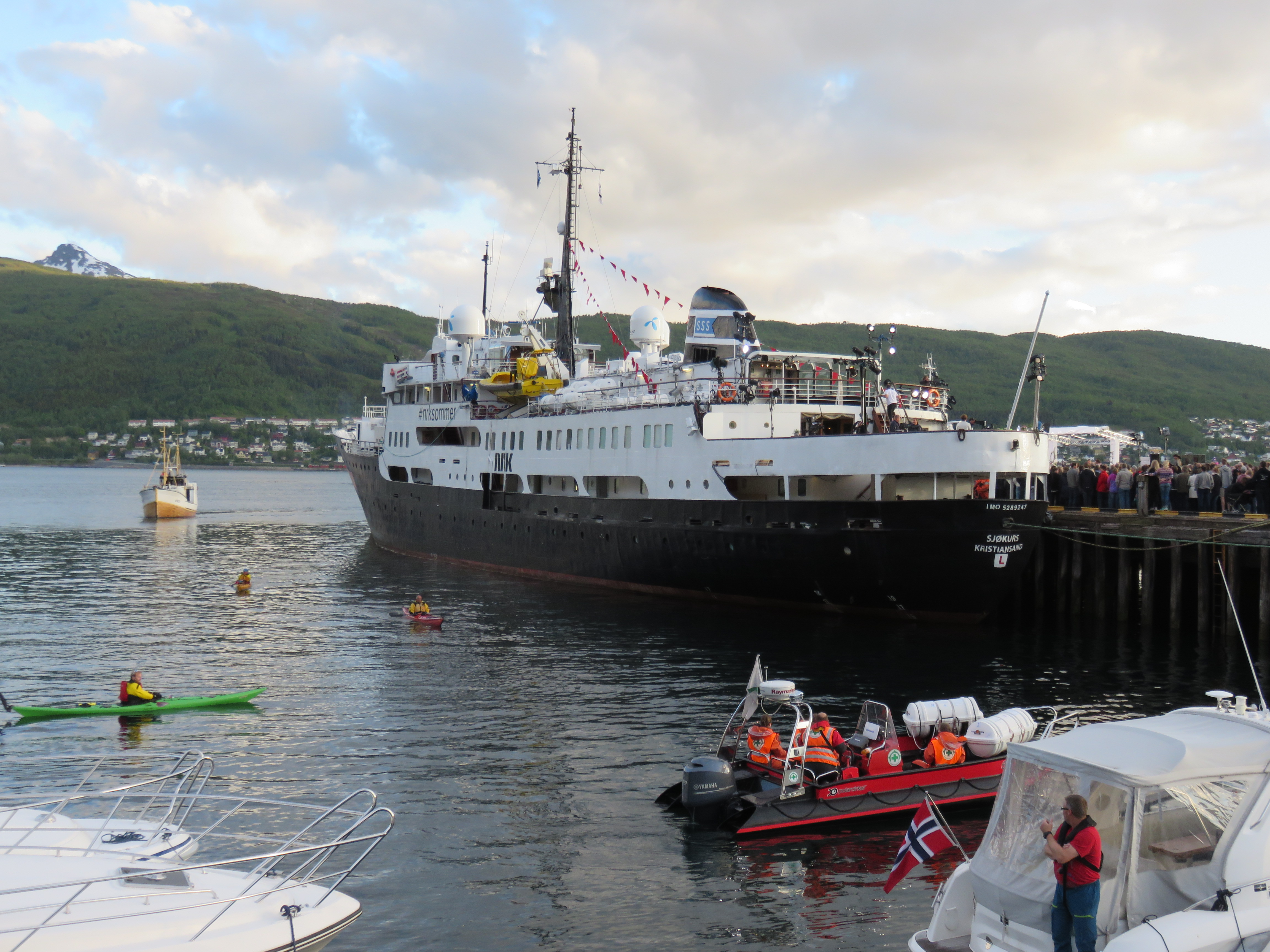 NRKs Sommeråpent i Narvik (30. juni 2015). MS Sjøkurs.